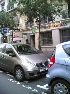 voiture en autopartage de mobizen à Paris, rue de Bretagne